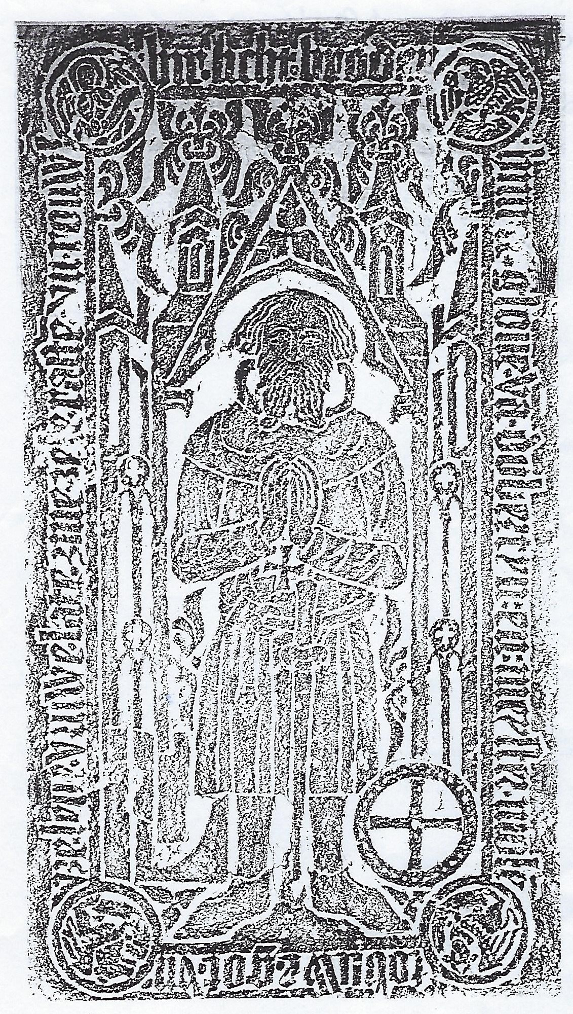 Abklatsch der Grabplatte vom Mühlenbauer Hinrik Glove († 1371) im südlichen Kreuzgang des Klosters Dobbertin: In den Ecken sind die Medaillons mit den Symbolen der vier Evangelisten. Der Kreis mit dem Kreuz ist das Kammrad. Der Verstorbene steht unter einem Maßwerk-Baldachin. Er hat die Hände gefaltet und trägt ein knielanges Gewand mit einer Gugel und spitzen Schuhen. Sein Bart ist onduliert, an seinem Gürtel hängt ein Nierendolch. Direkt unterhalb der Hände ist ein griechisches Kreuz vermutlich von einer Gebetskette. In der linken Ecke über seinem rechten Schuh steht die Axt als Berufsbezeichnung des Mühlenbauers. Zum Steinoriginal siehe File:Dobbertin Kloster - Kreuzgang Grabplatte 1 Mühlenbauer.jpg.